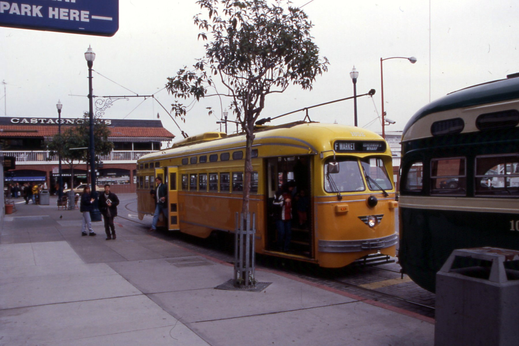 20010303 28 Muni PCC Jones St. @ Beach St.